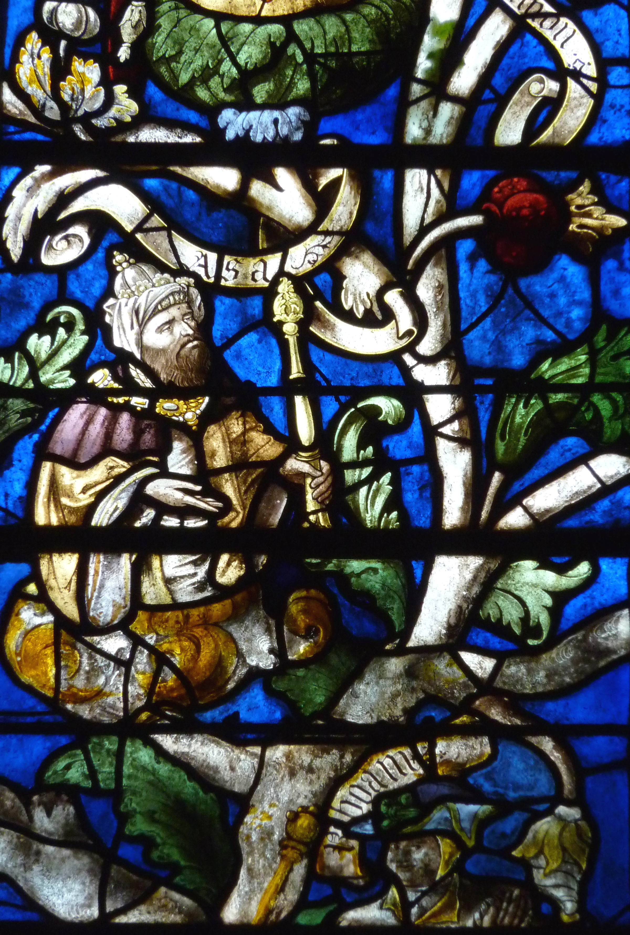 Katholische Pfarrkirche Saint-Martin in Herblay, einer Gemeinde im Département Val d'Oise (Île de France), Bleiglasfenster aus dem 16. Jh. mit der Darstellung der Wurzel Jesse, Ausschnitt: König Asa